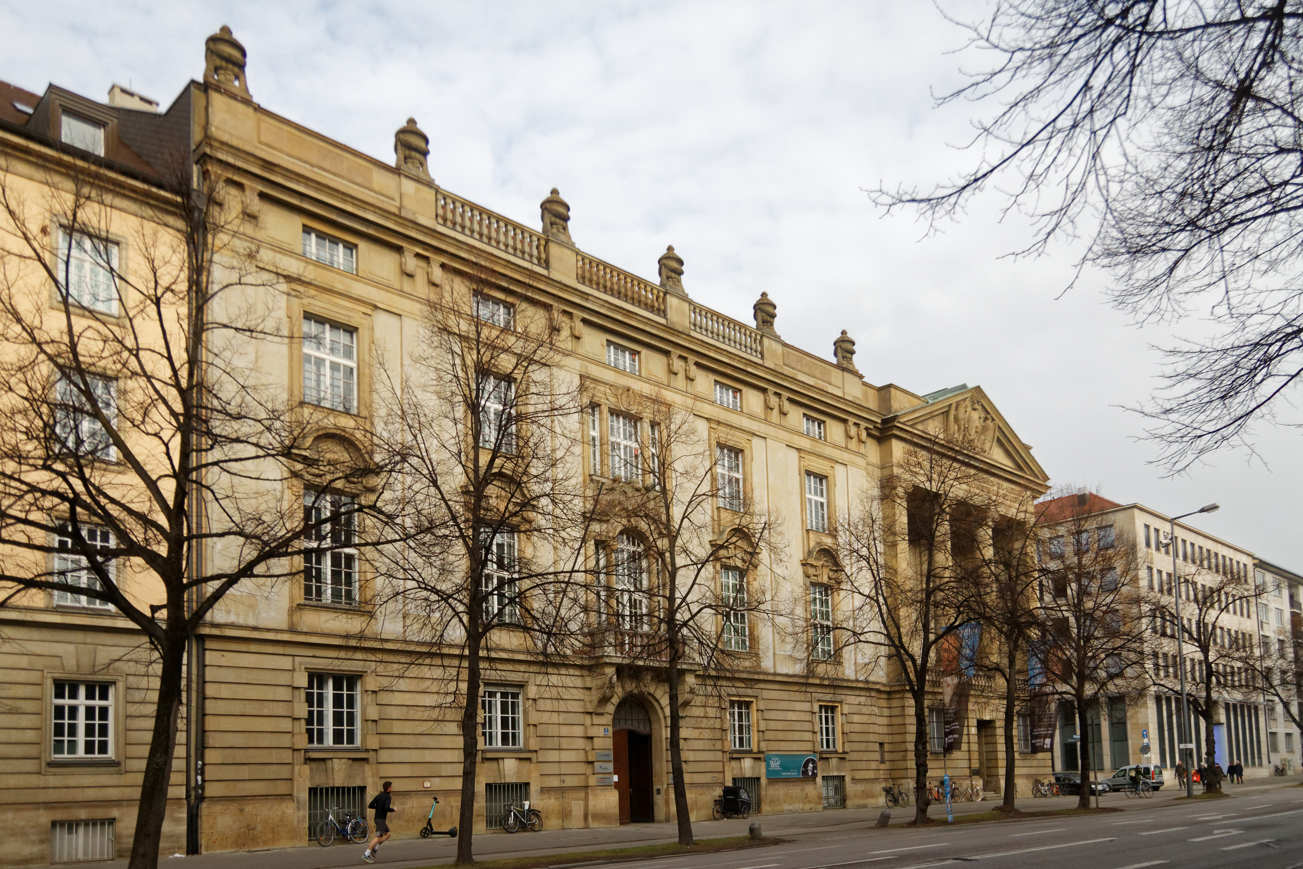 Gebäudekomplex aus ehemaliger preußischer Gesandschaft und Schackgalerie in der Prinzregentenstraße 7 in München